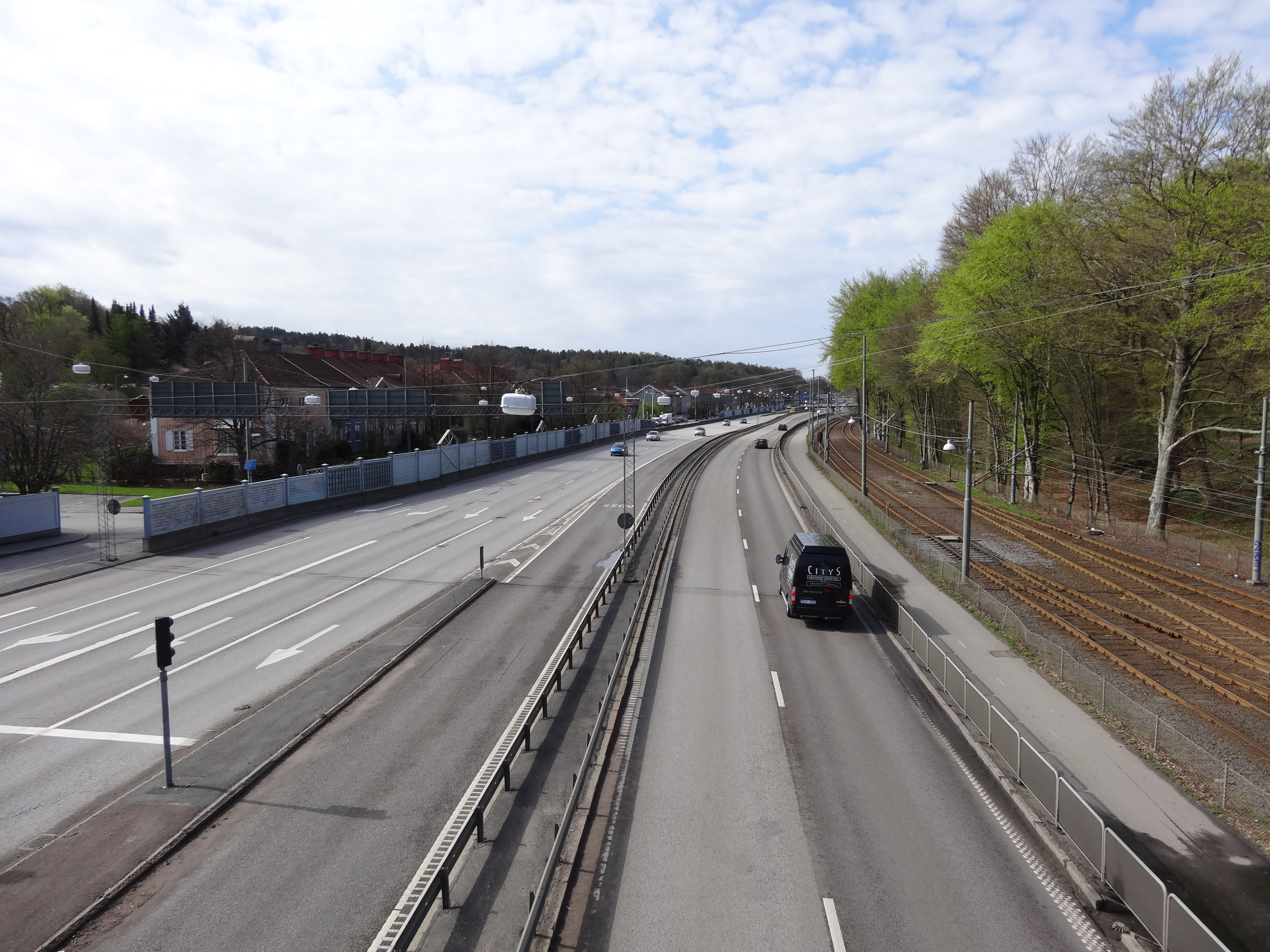 Dag Hammarskjöldsleden i Göteborg. Vy söderut från gångbron i höjd med Slottskogen.